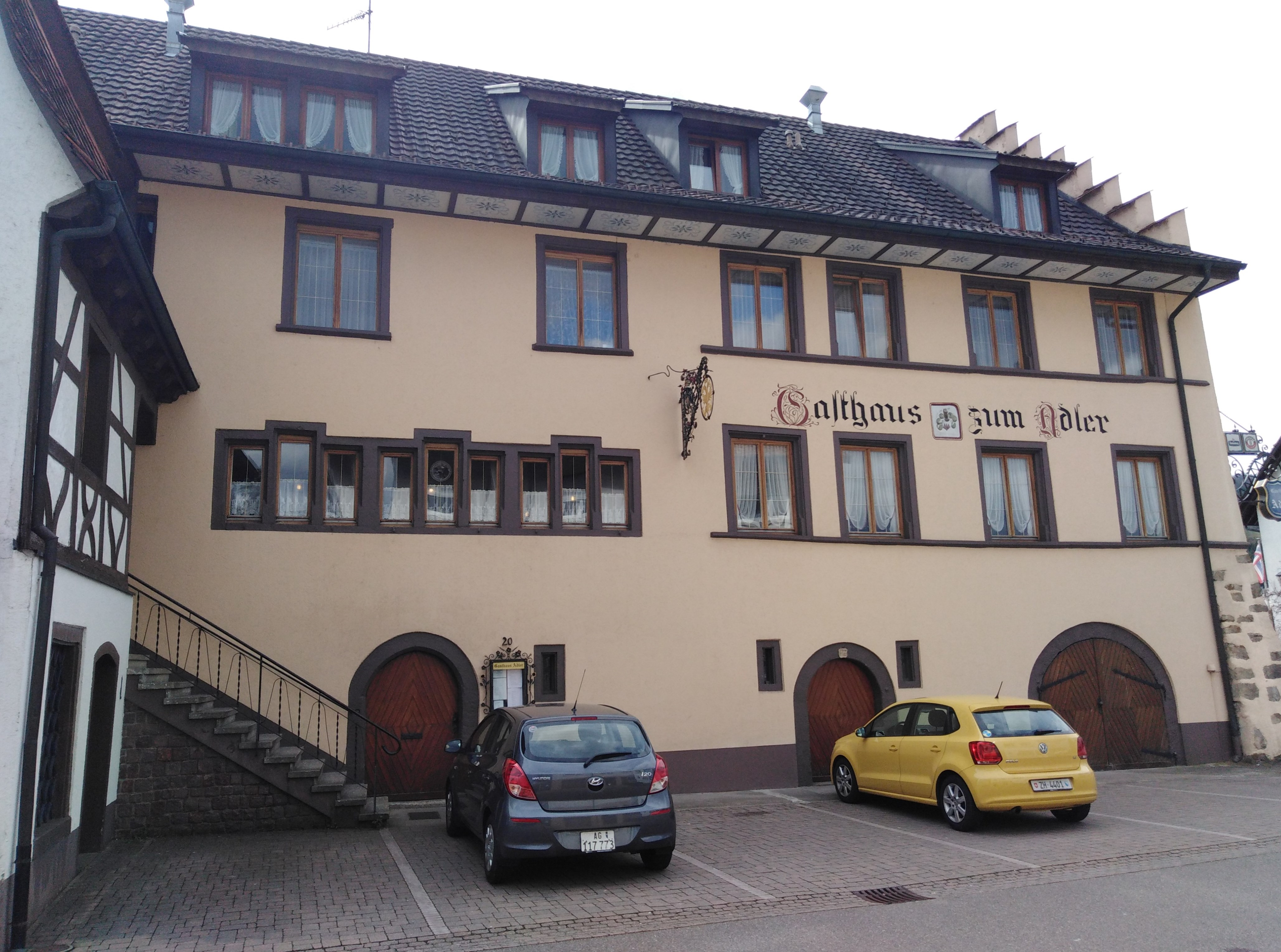 Lauchringen, Gemeinde im Landkreis Waldshut in Baden Württemberg. Der seit über 700 Jahren bestehende Gasthof Adler in Oberlauchringen.